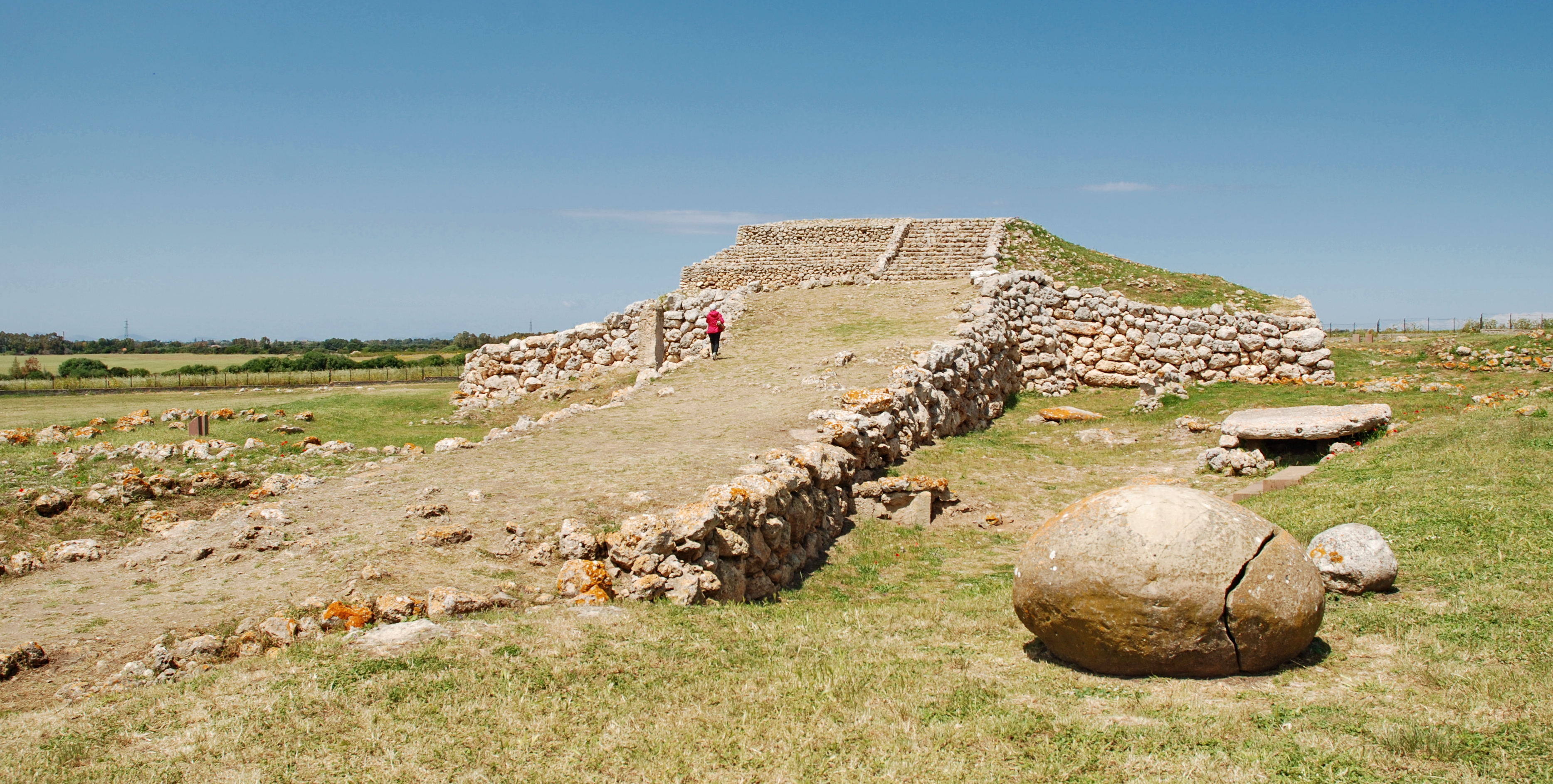 Monte D'Accoddi - MIBAC This is a photo of a monument which is part of cultural heritage of Italy.